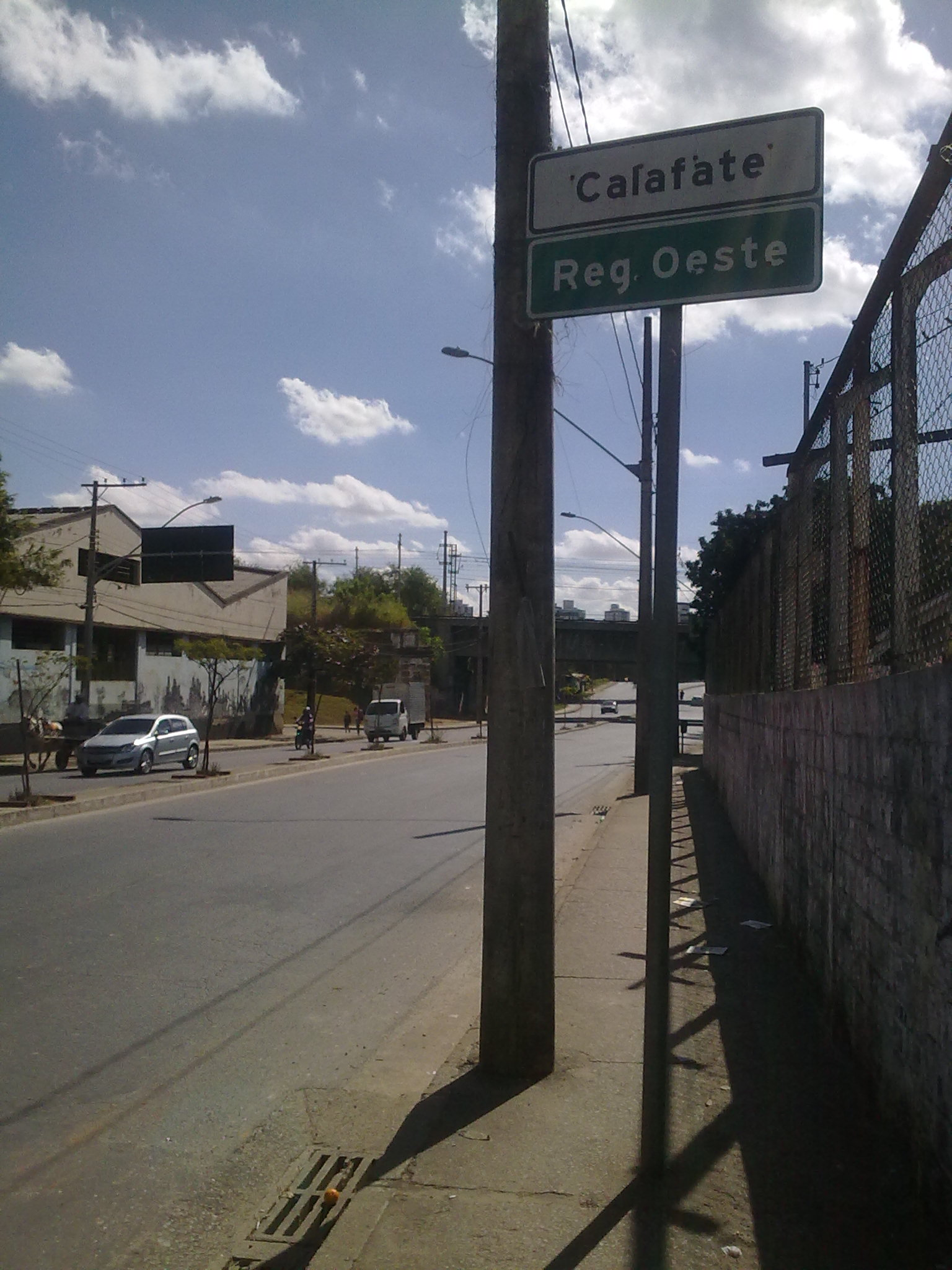 Placa no bairro Calafate, em Belo Horizonte, Brasil.